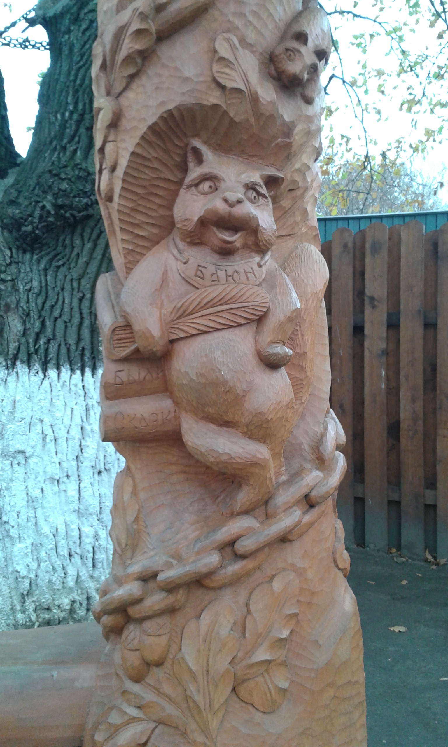 Chat des contes merveilleux russes